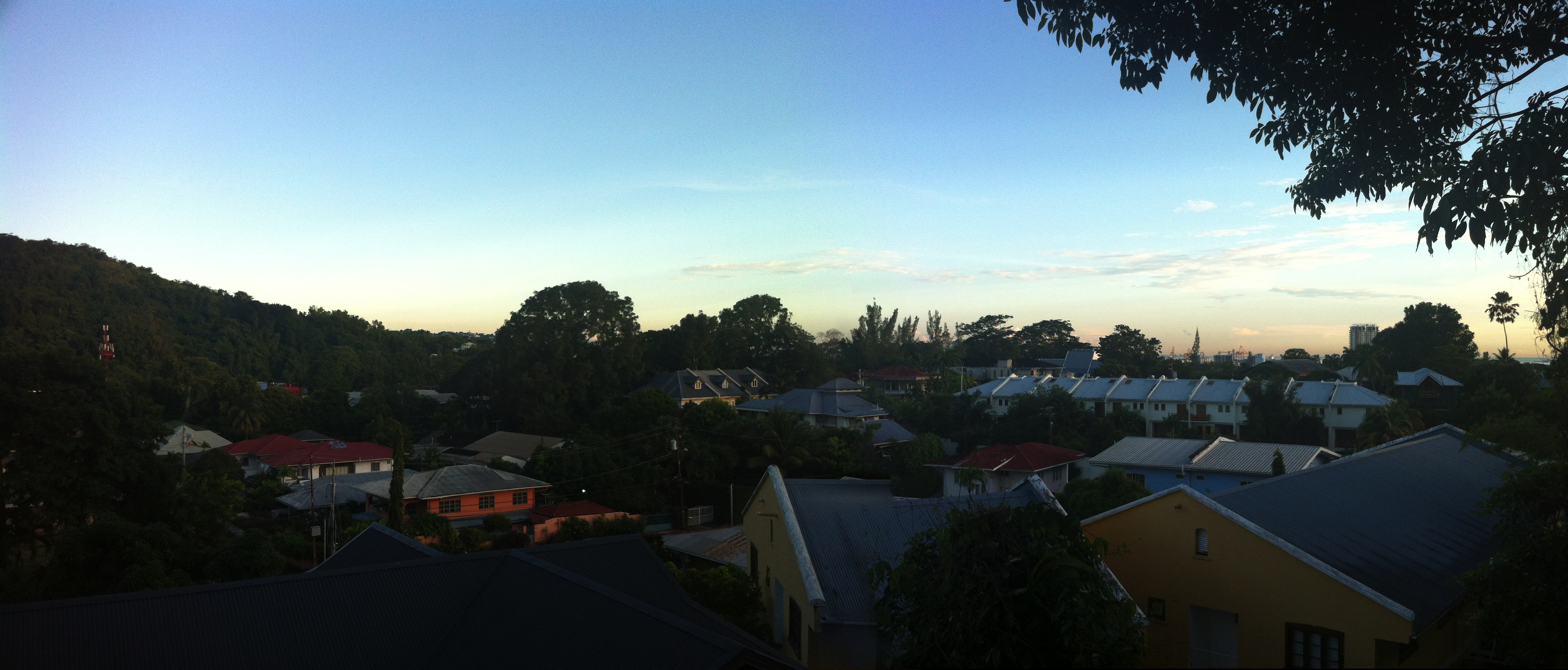 Maraval skyline